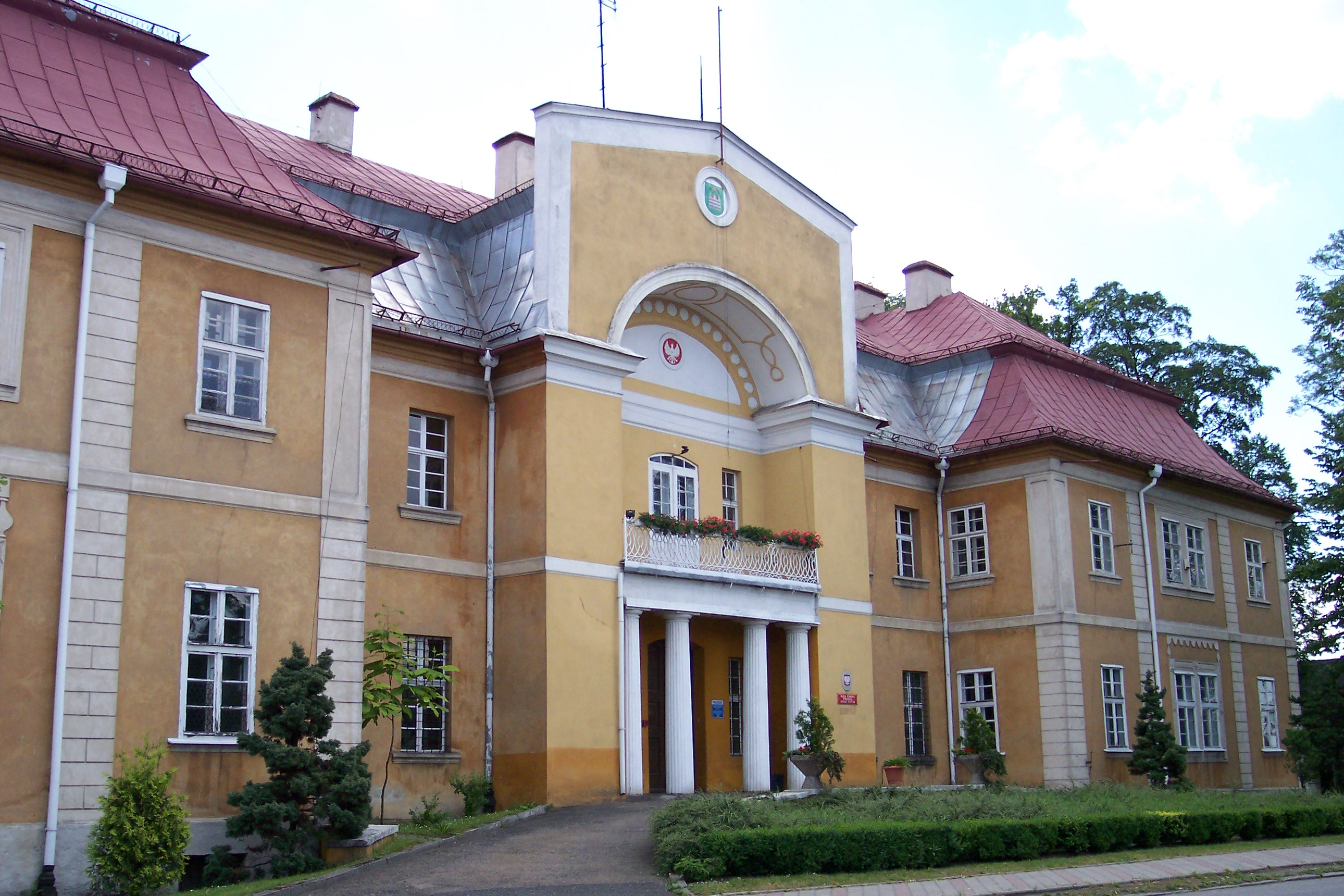 Zamek w Tworogu